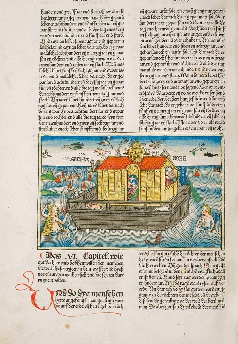 Strona z ilustrowanego wydania Pisma Świętego w języku niemieckim.